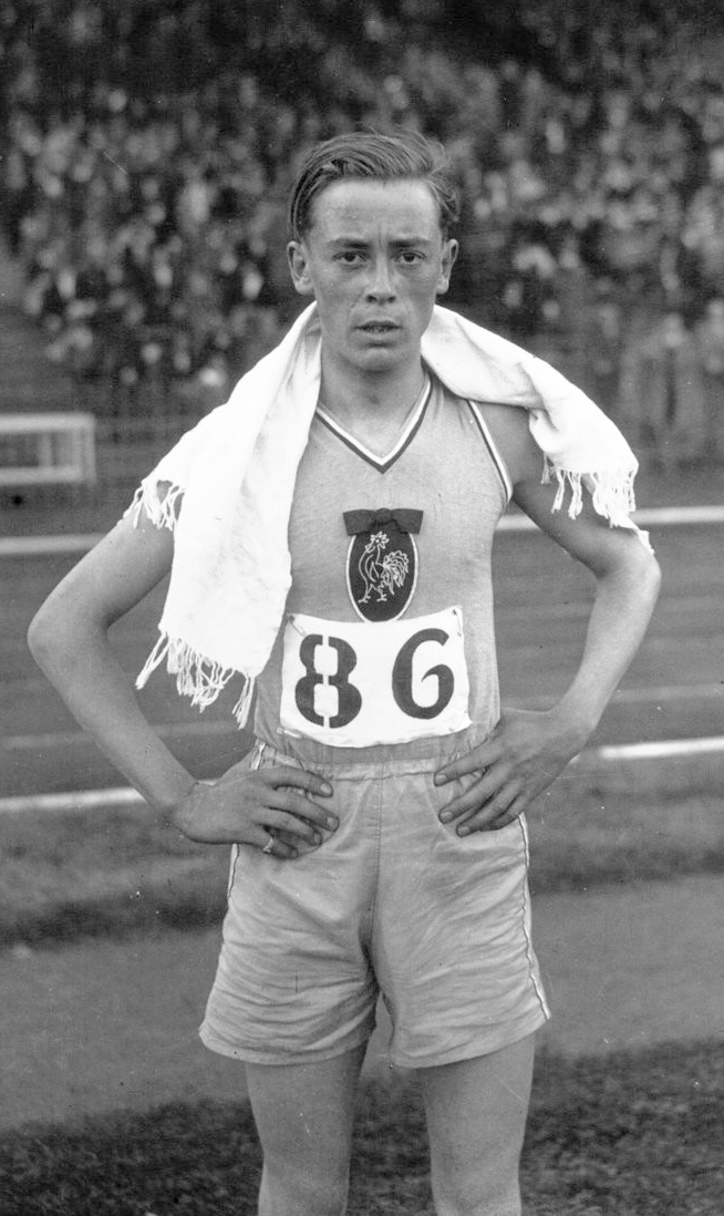 Colombes : France-Allemagne, athéltisme : Rochard (portrait à 3 m) : [photographie de presse] / Agence Meurisse